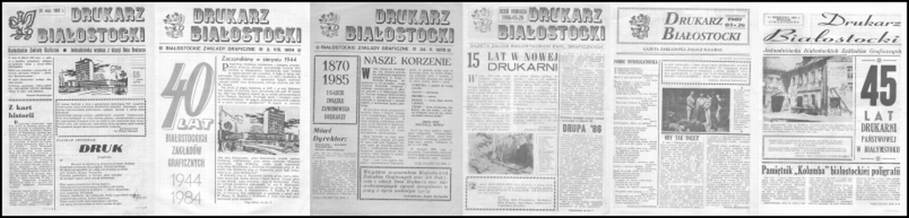 Gazetka "Drukarz Białostocki"